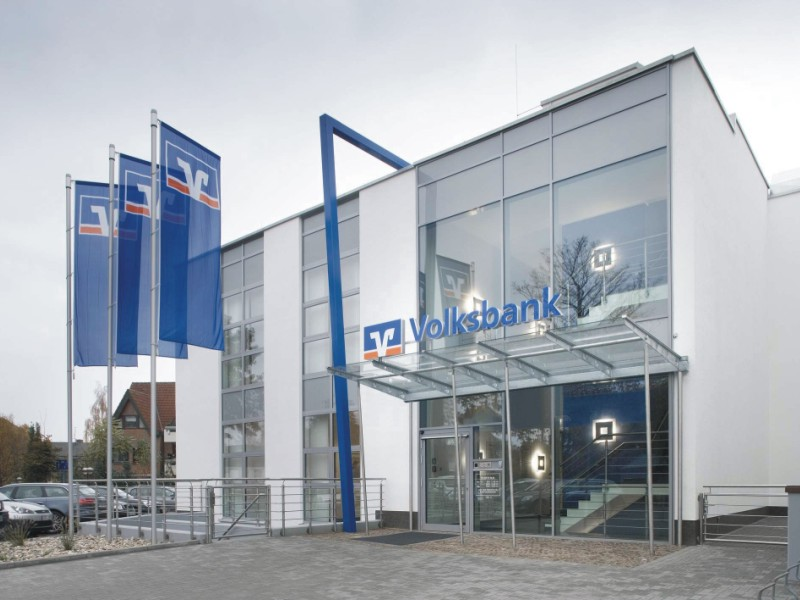 Die Hauptstelle der Volksbank Ochtrup eG, Bergstr. 6, 48607 Ochtrup.